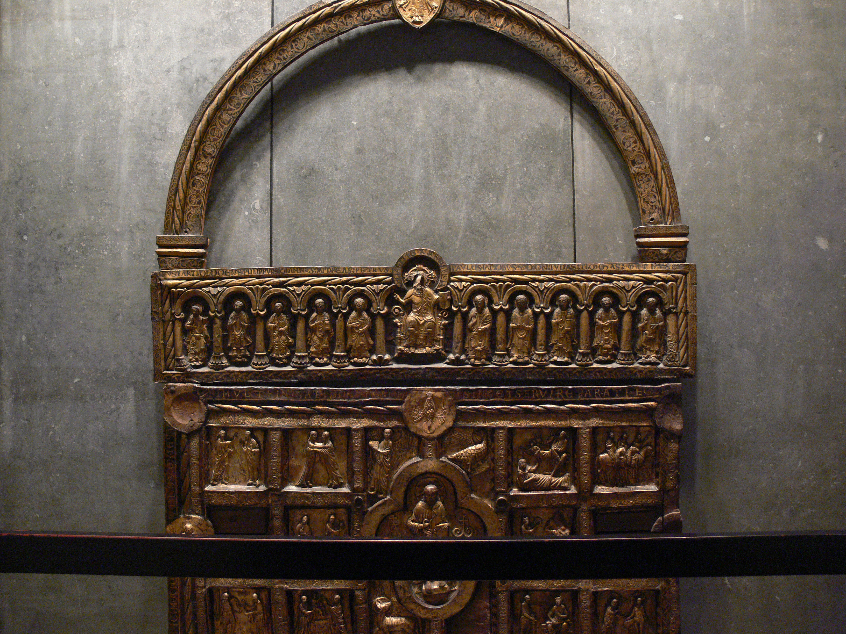 Altar der Odder Kirche im Museum von Kopenhagen.